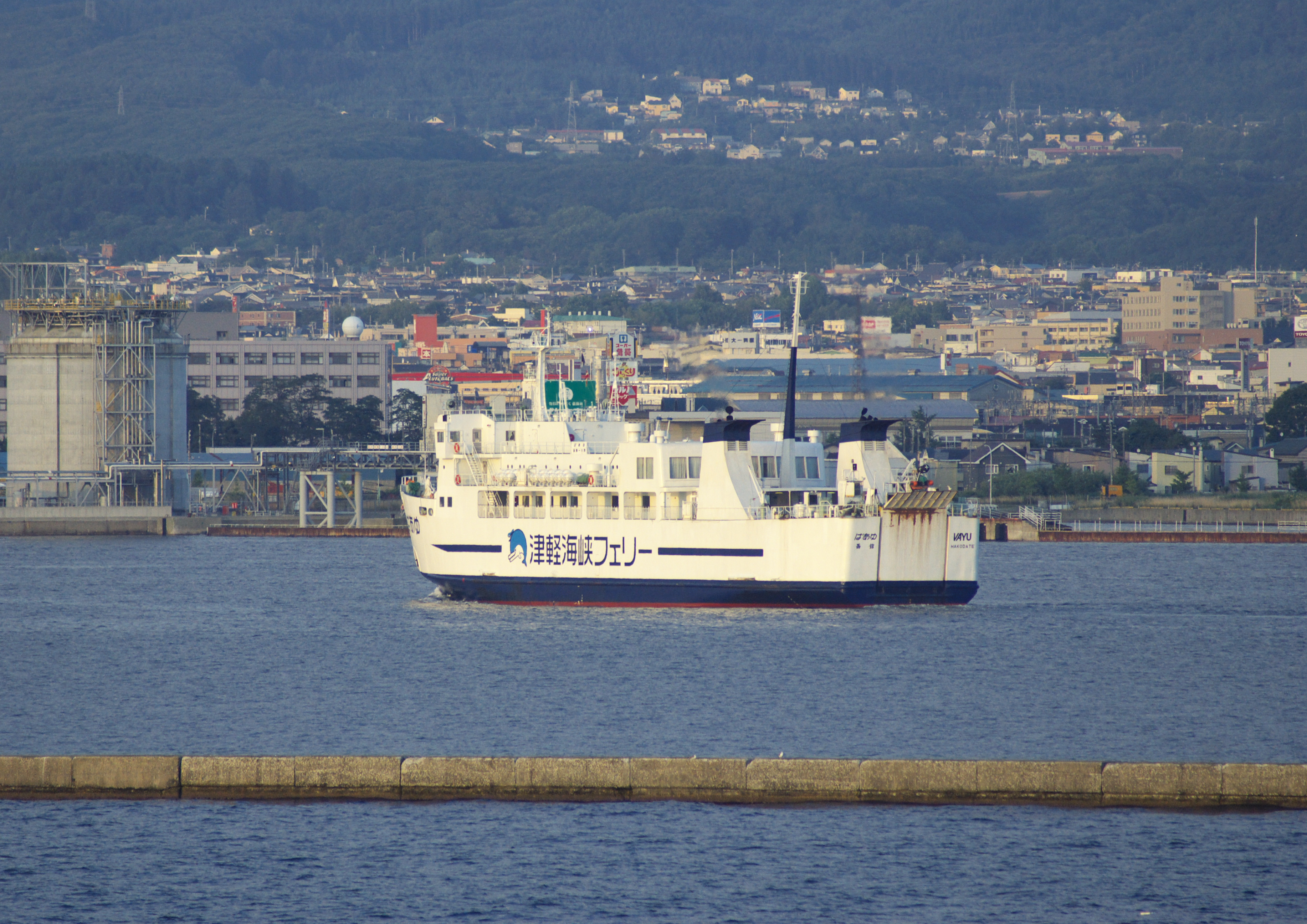 函館港内を航行する津軽海峡フェリー「ばあゆ」、2012年8月20日撮影。